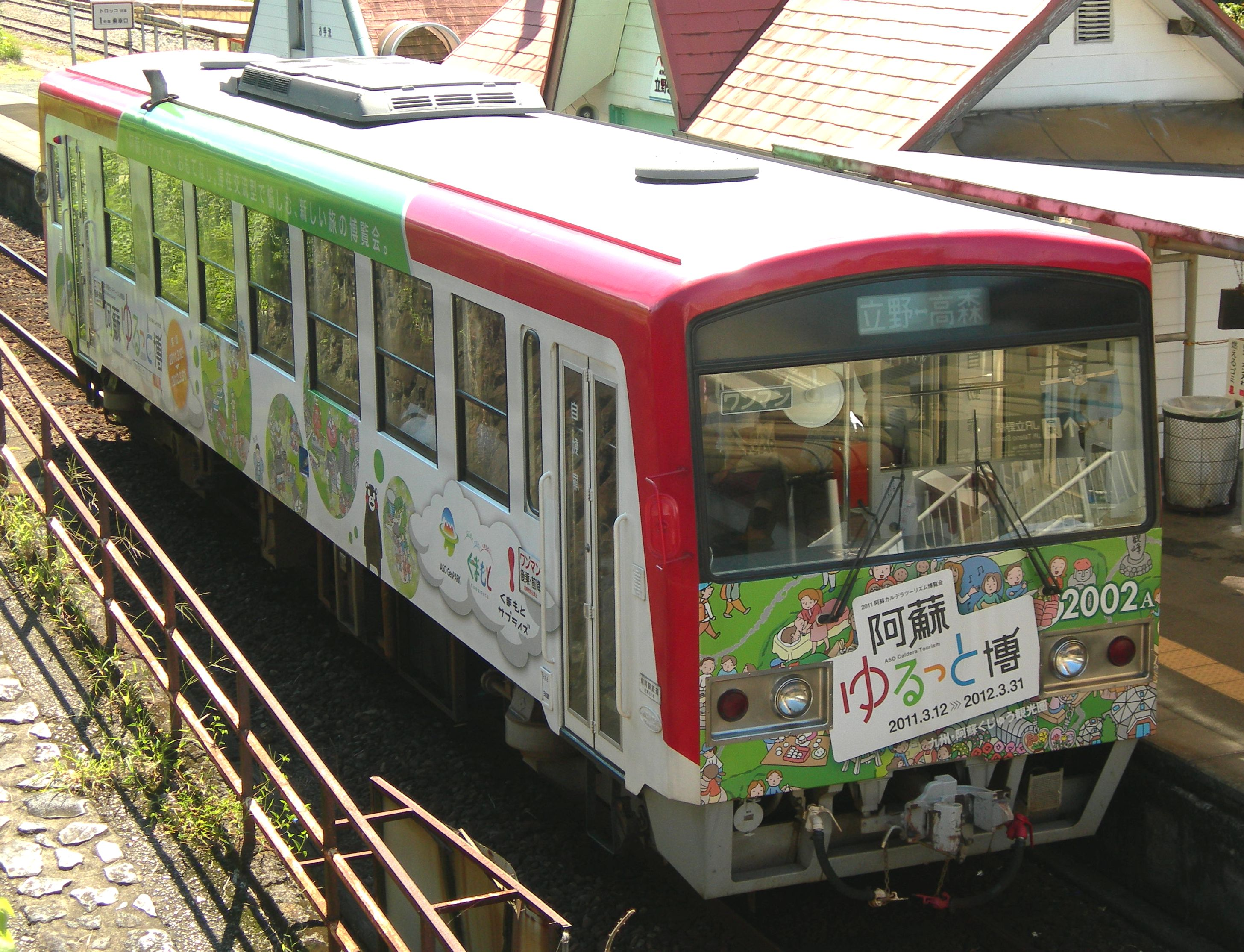 南阿蘇鉄道 MT2000形